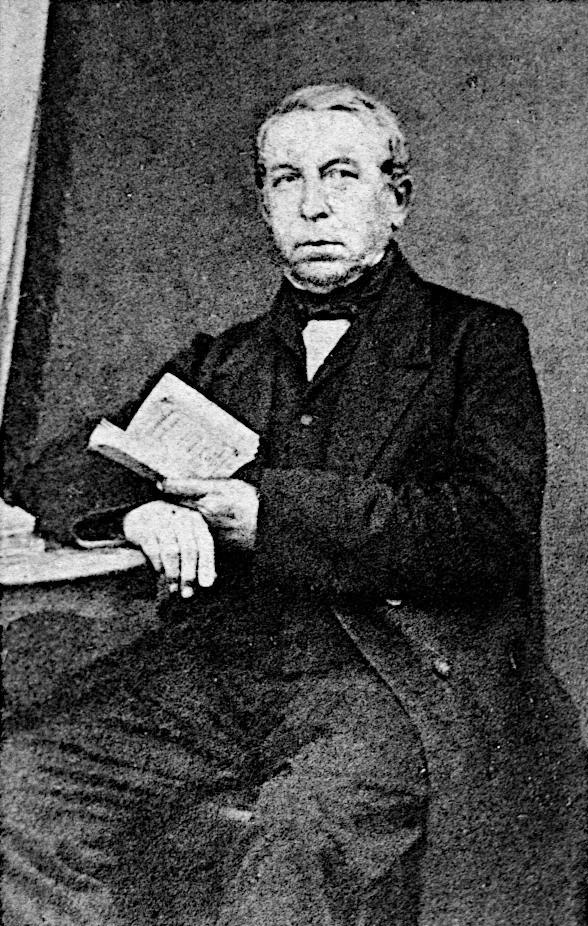 Хандриј Зејлер (1804—1872)